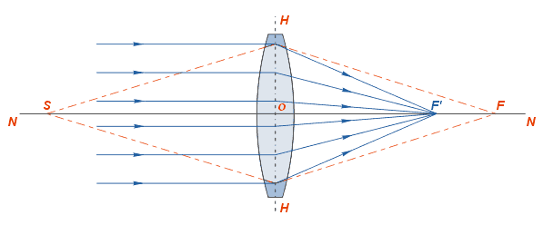 Object